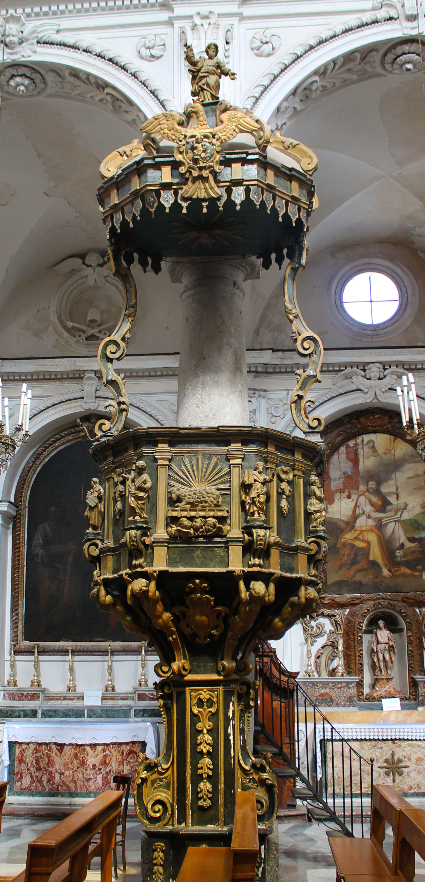 Pulpito